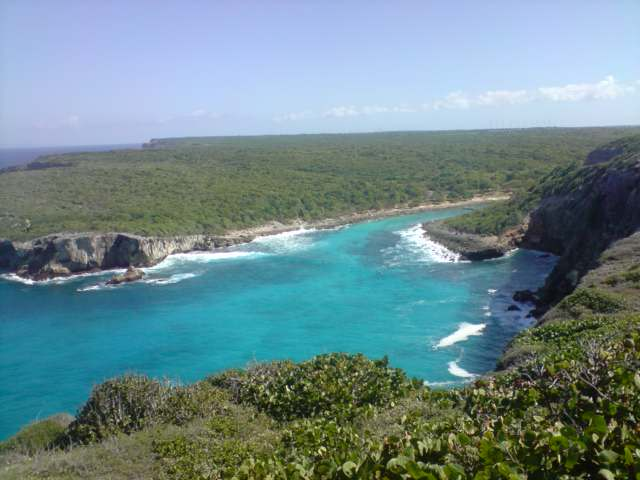 Les Portes de l'Enfer